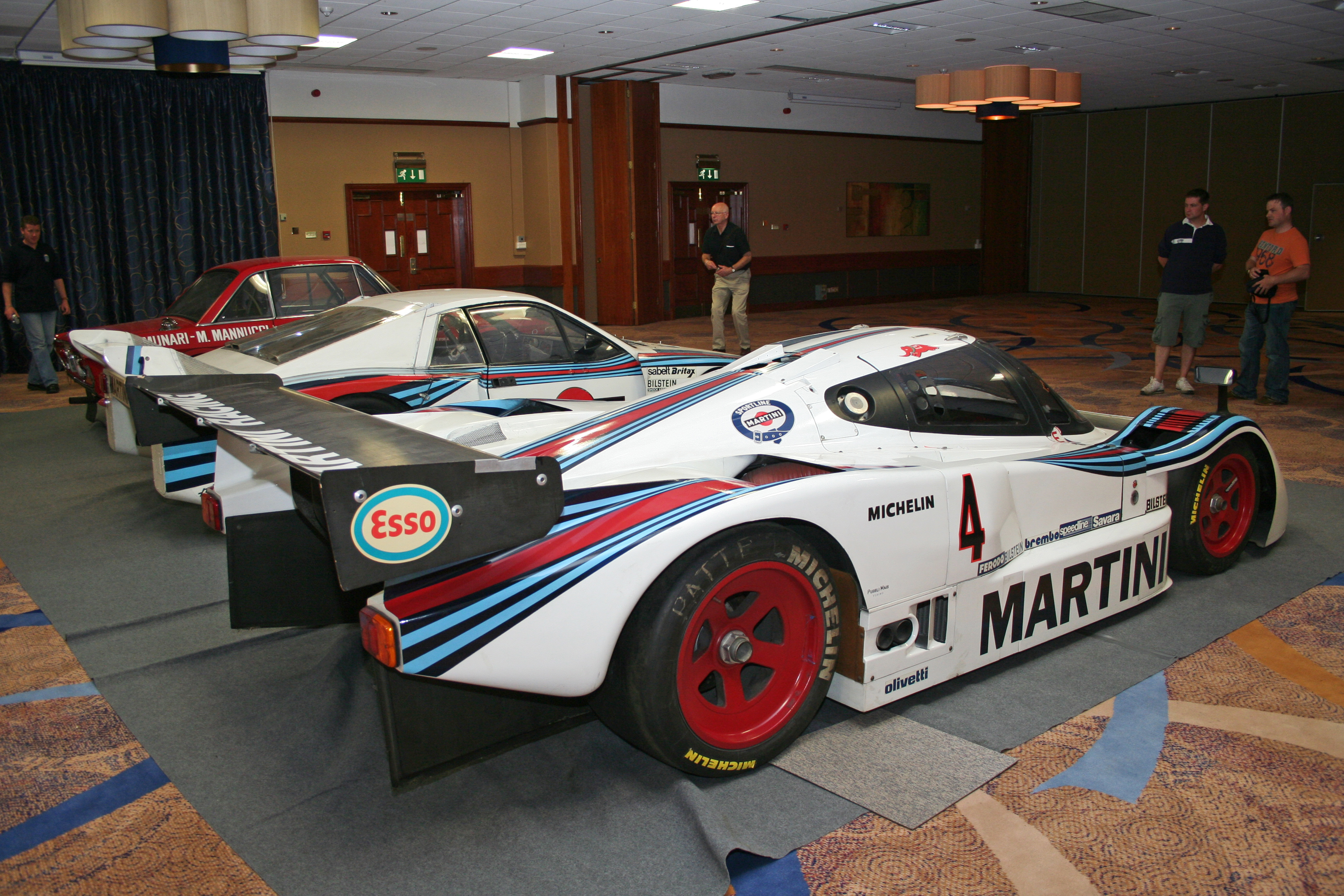 A Lancia LC2